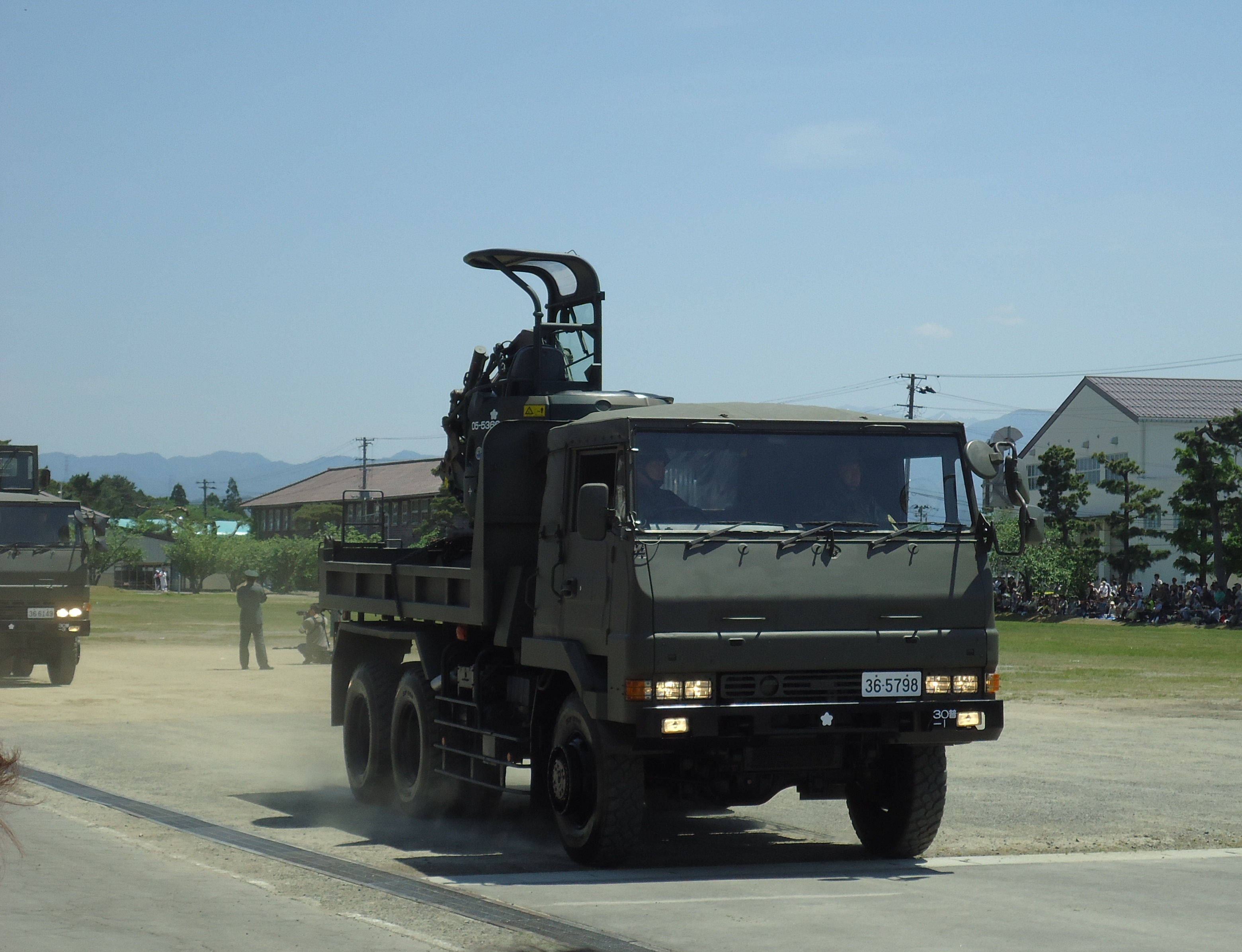 2016年新発田駐屯地開放にて撮影した73式大型トラックと小型ショベルドーザ